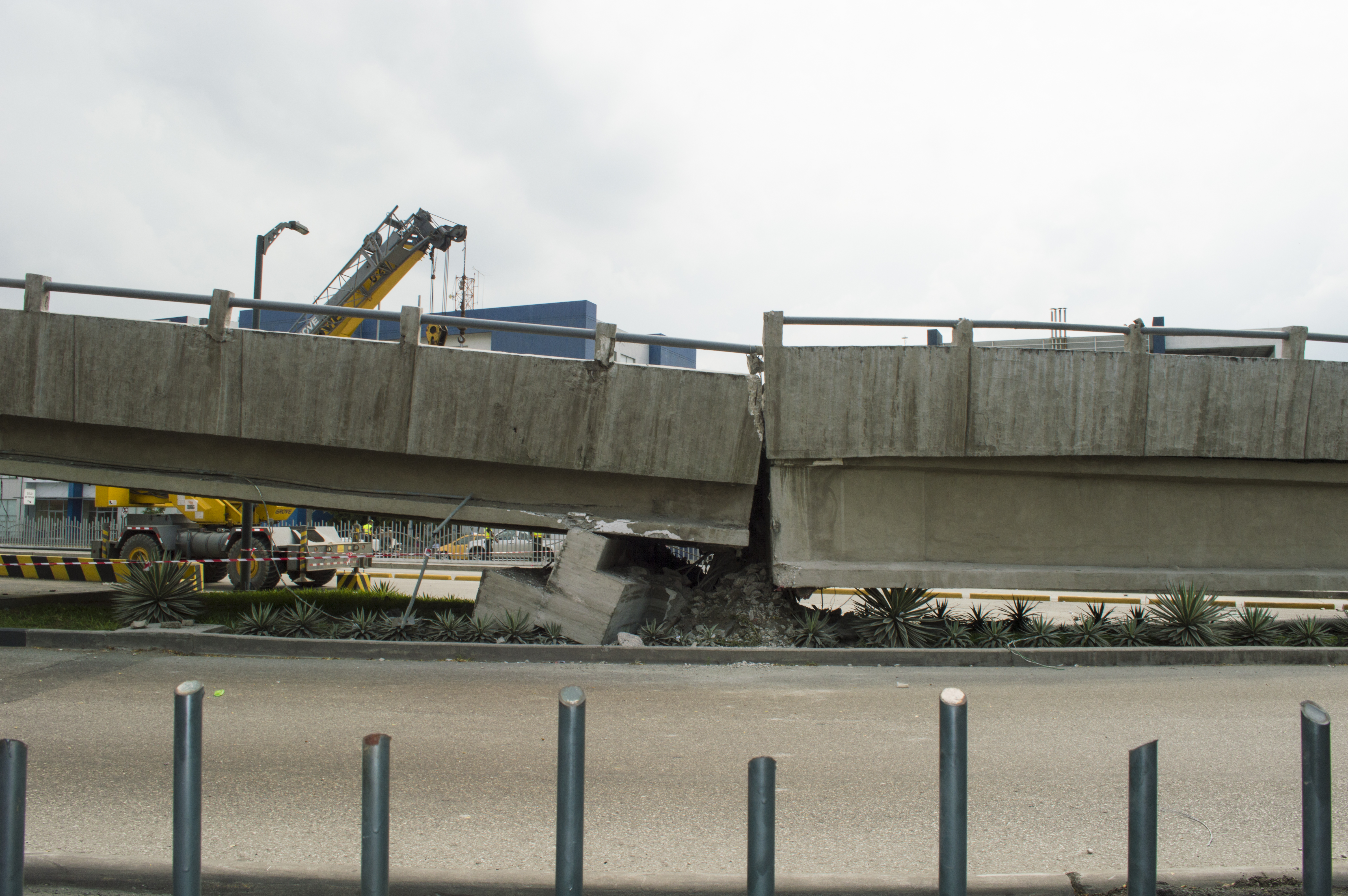 Puente de la avenida de las Américas colapsado luego del terremoto que sufrió Ecuador.